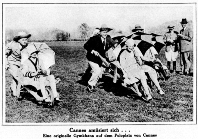 Fotos einer Gymkhana anno 1929